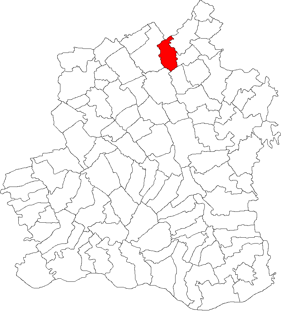 Categorie:Hărţi ale judeţului Teleorman